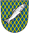 Znak obce Rýžoviště